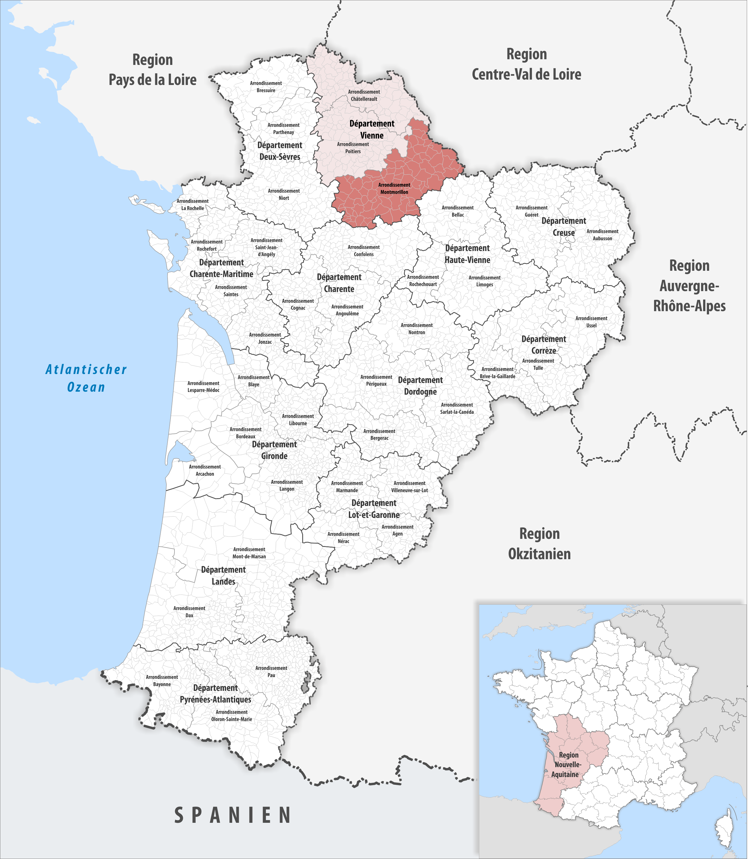 Lage des Arrondissements Montmorillon